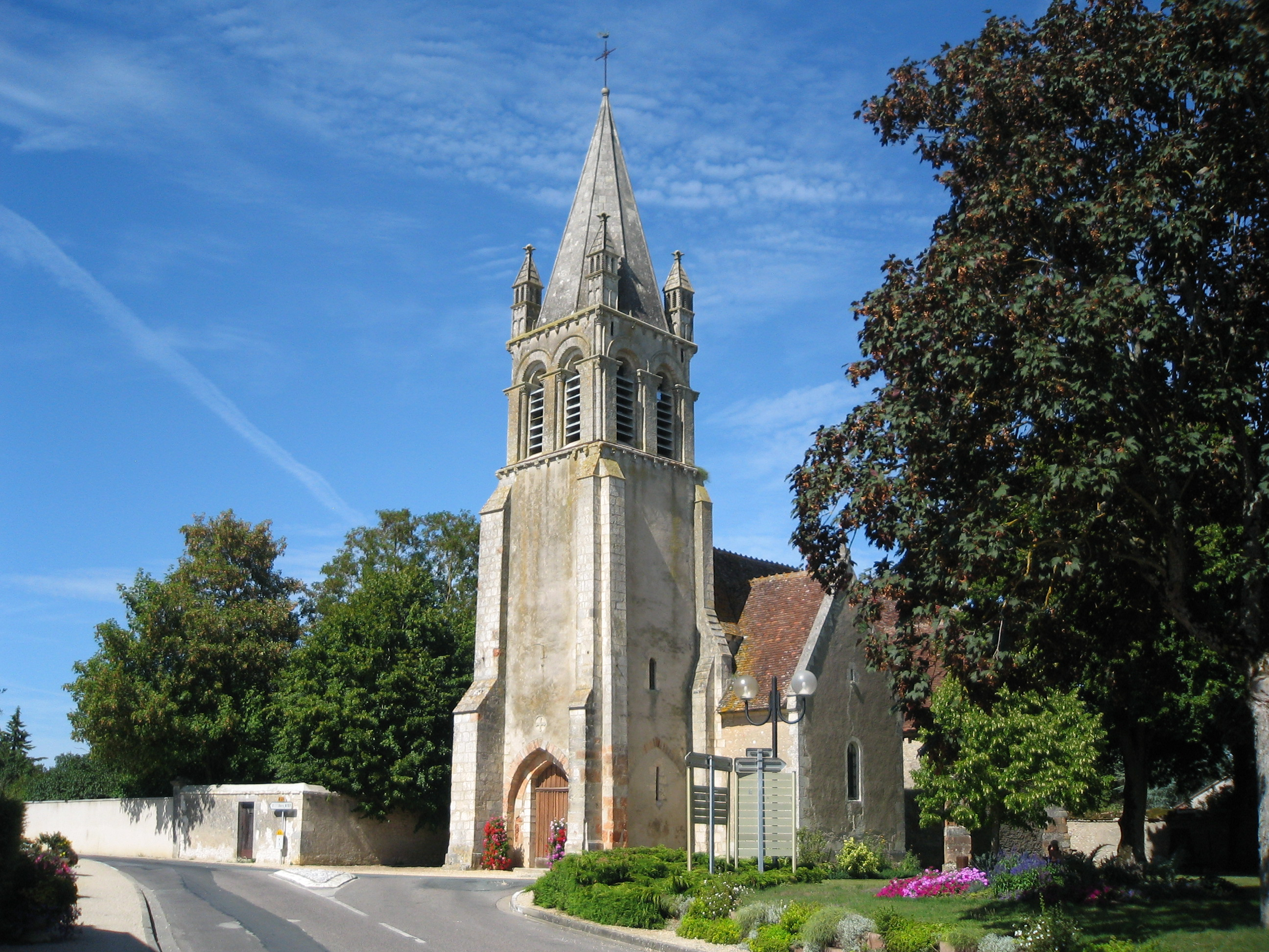 Eglise Notre Dame, XIIe, XVe et XIXe, Le Subdray